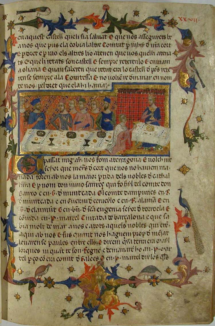 Libre dels Feyts